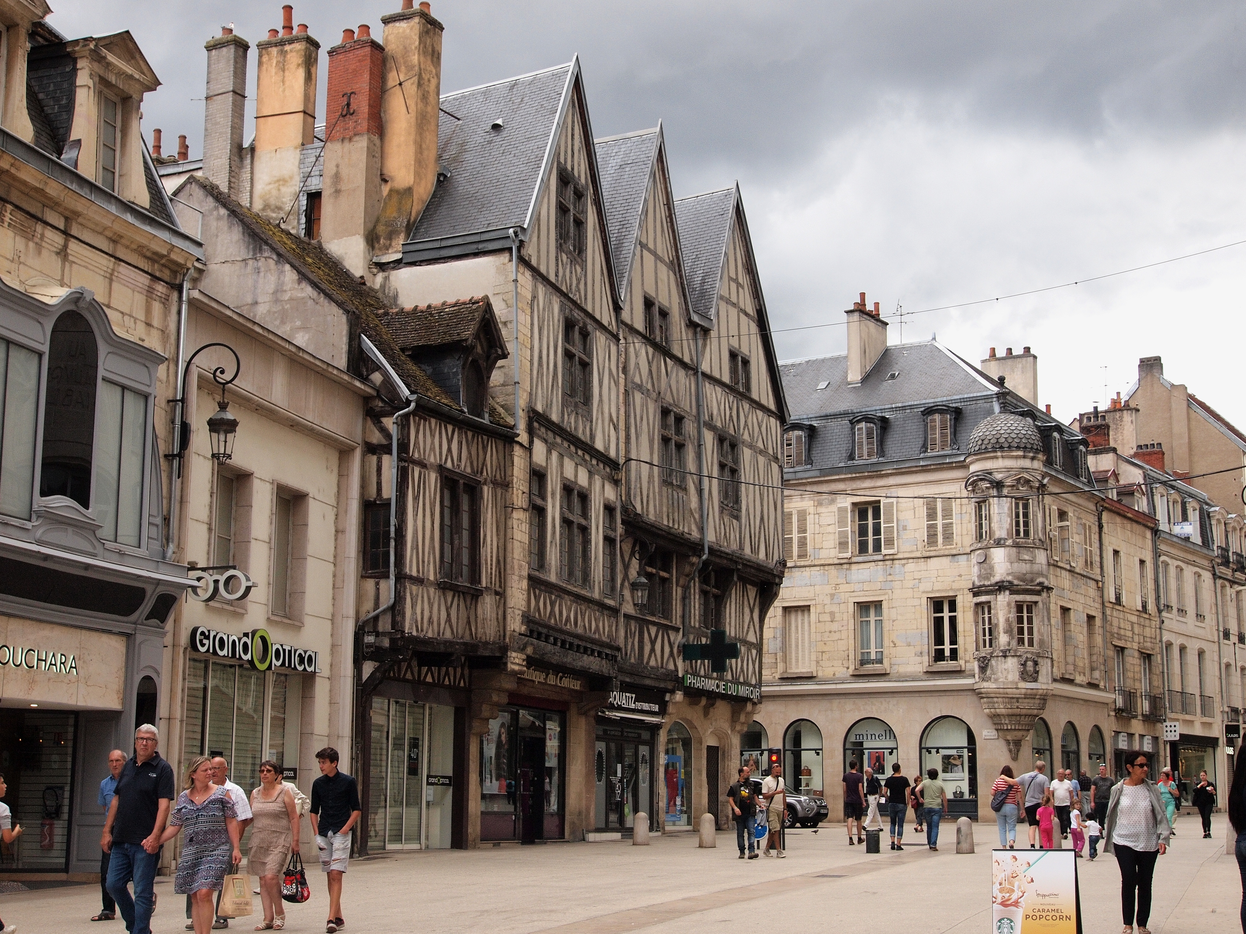 Dijon